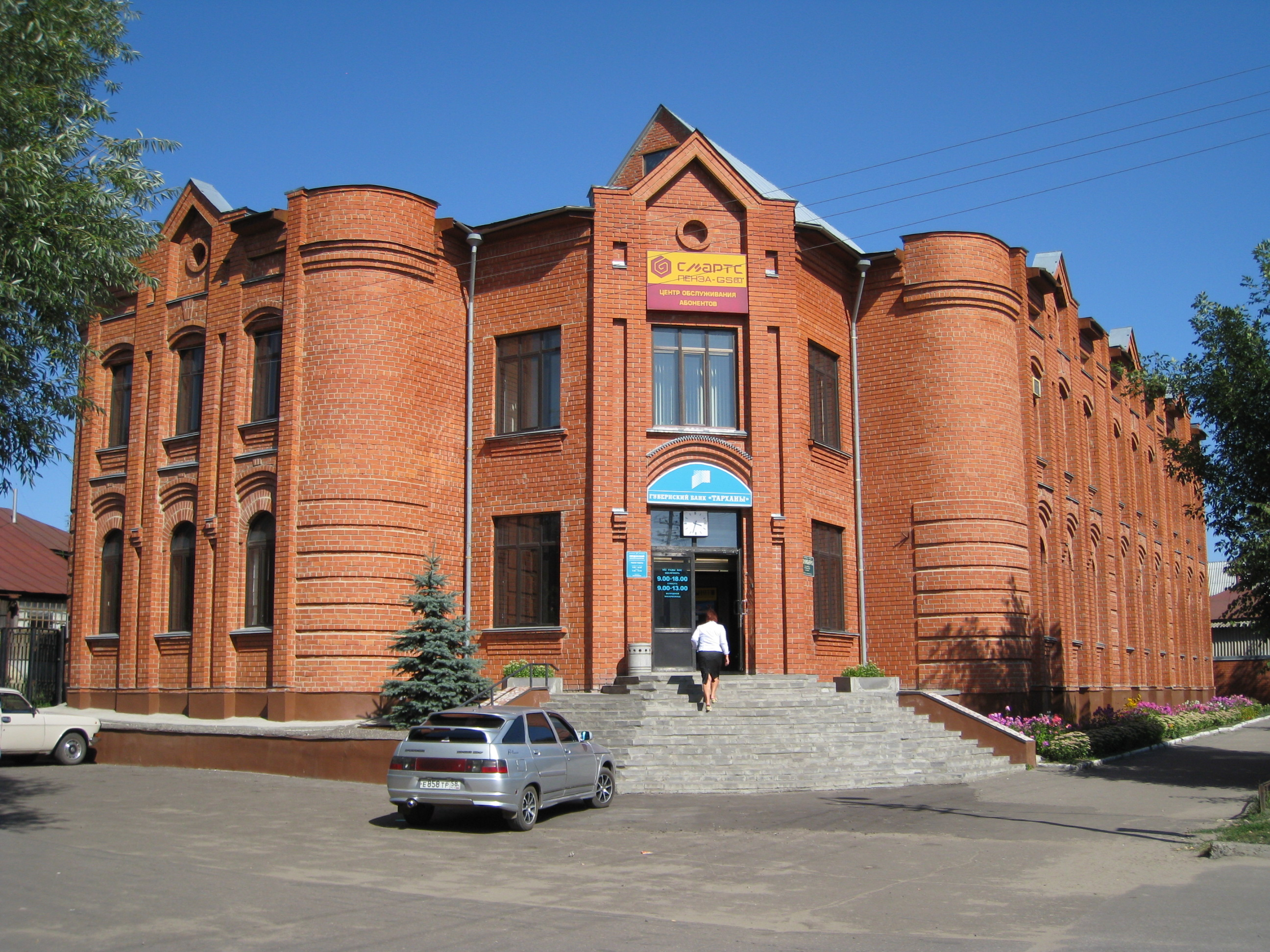 Отделение банка «Тарханы», 2009 год